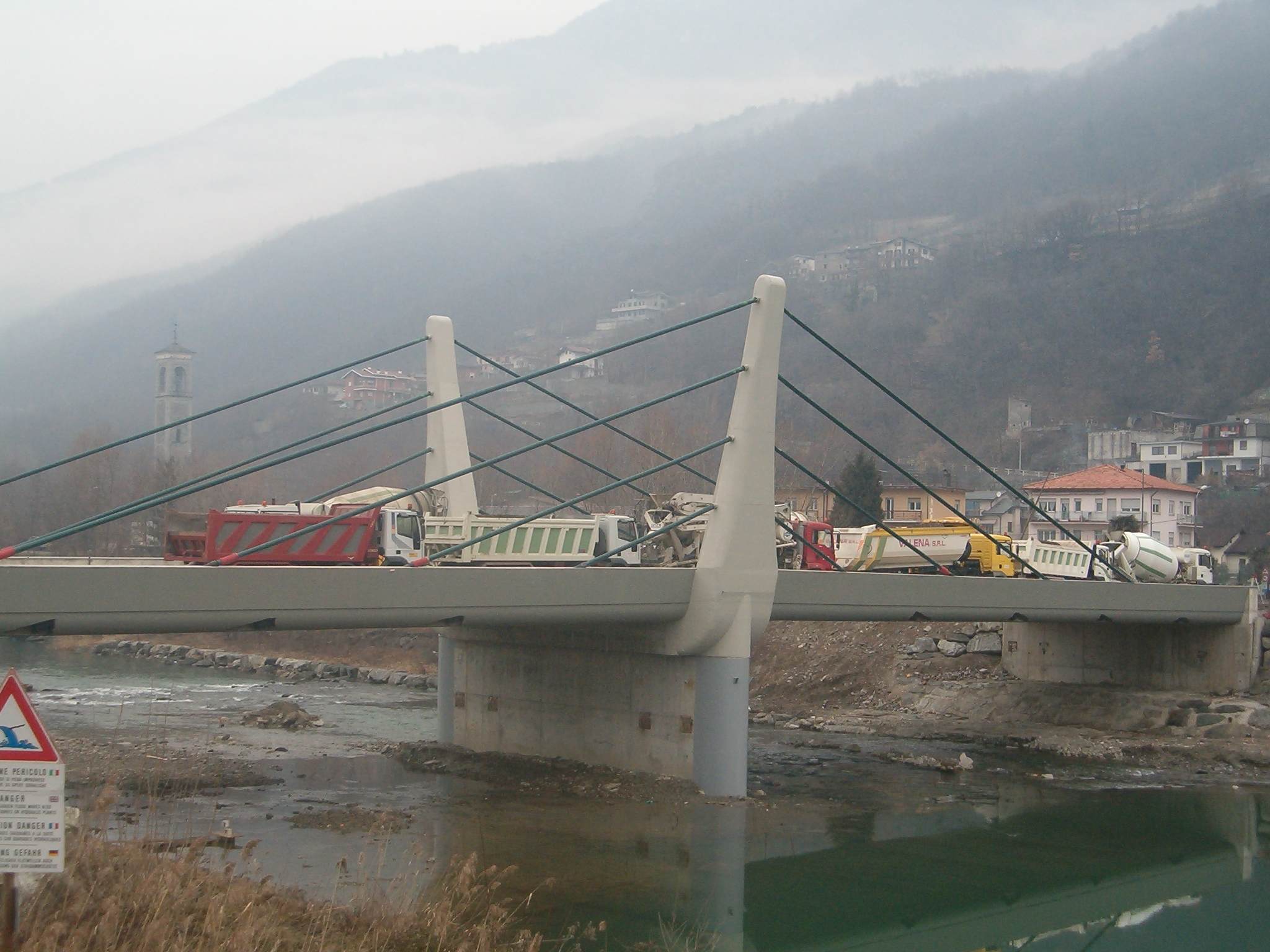 Stayed cable bridge in Mantello, Sondrio - Ponte strallato nel Comune di Mantello, Sondrio